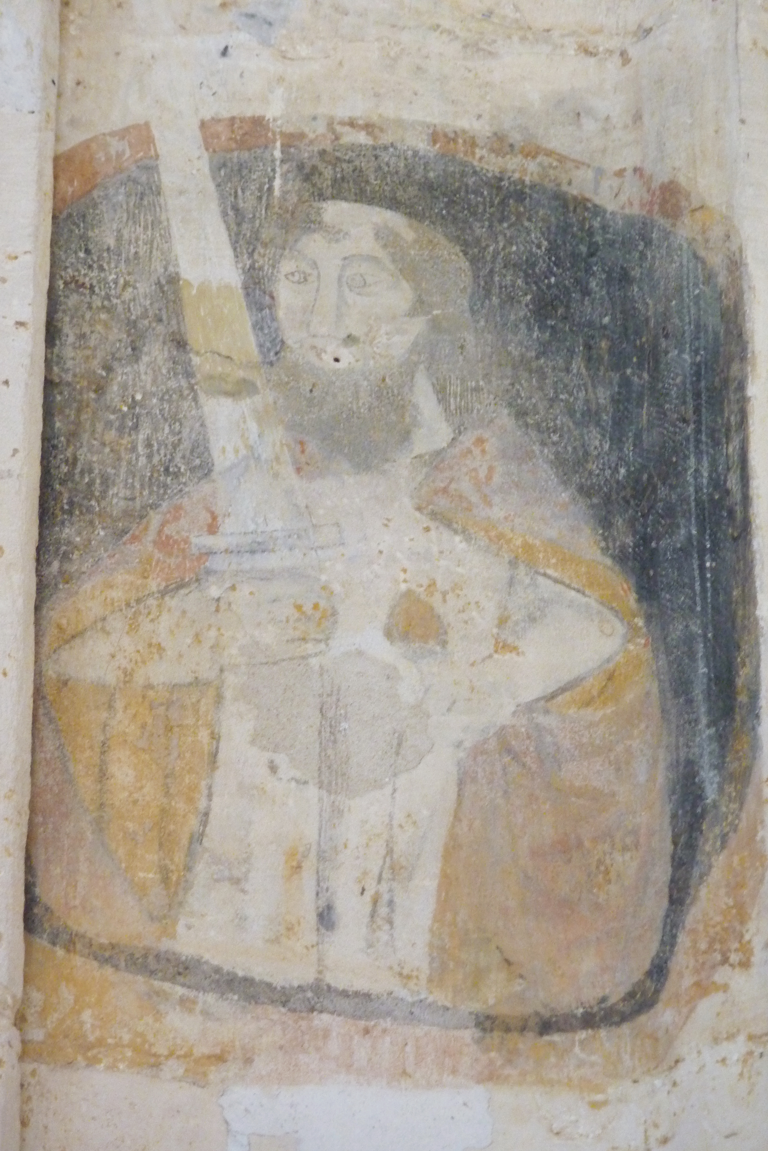 Katholische Pfarrkirche Saint-Didier in Villiers-le-Bel, einer Gemeinde im Département Val d'Oise (Île de France), mittelalterliche Malerei, Darstellung: Christus